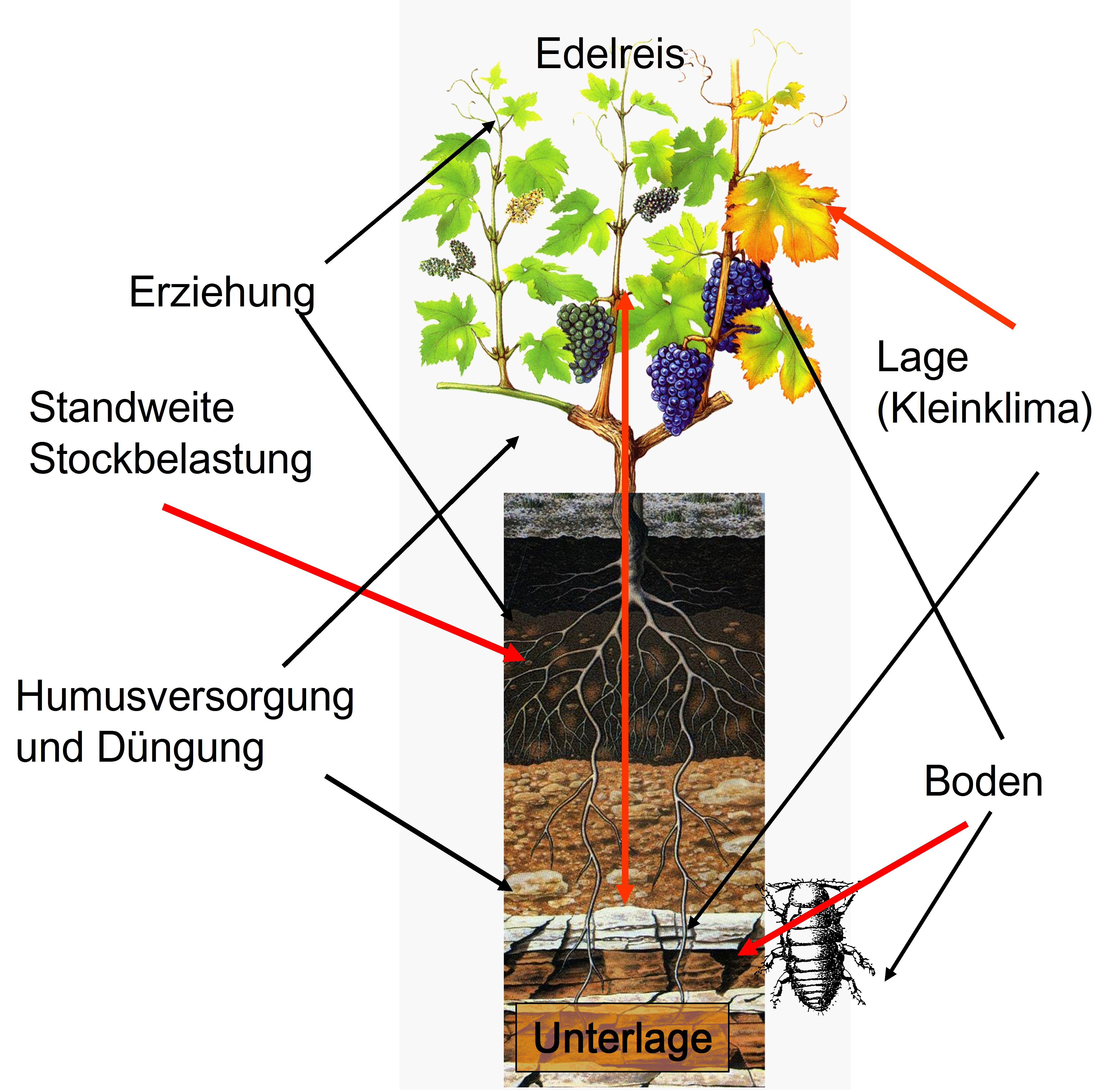 Rebstock mit Wurzel